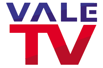 Logo de la cadena de Televisión VALE